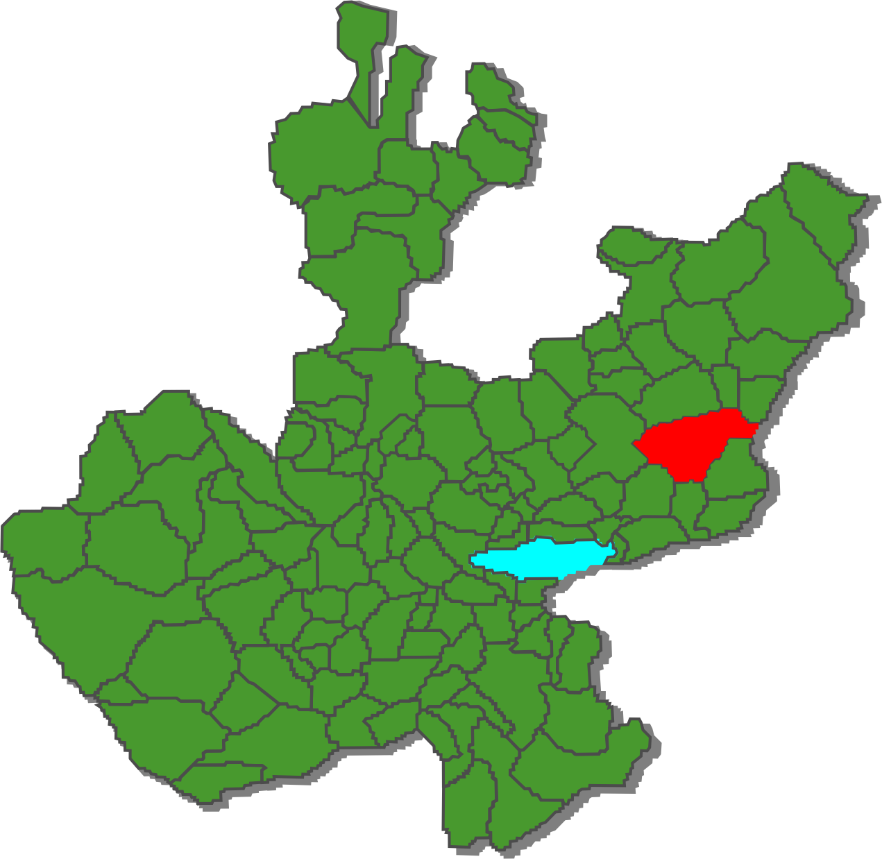 Mapa de ubicación del municipio de Arandas en Jalisco.